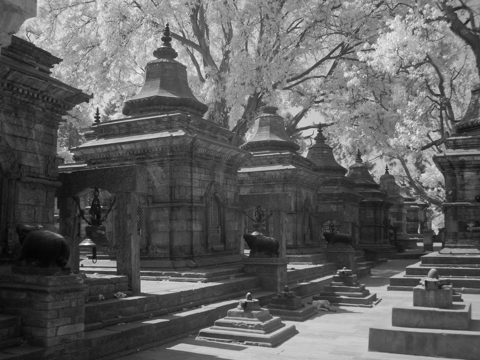 Shiva Shrines